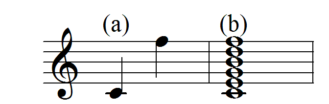 Bildbeschreibung: Notenbeispiele für Undezimintervalle Quelle: selbst gebastelt Fotograf/Zeichner: Torsten Roeder Datum: 16.12.05 andere Versionen: keine